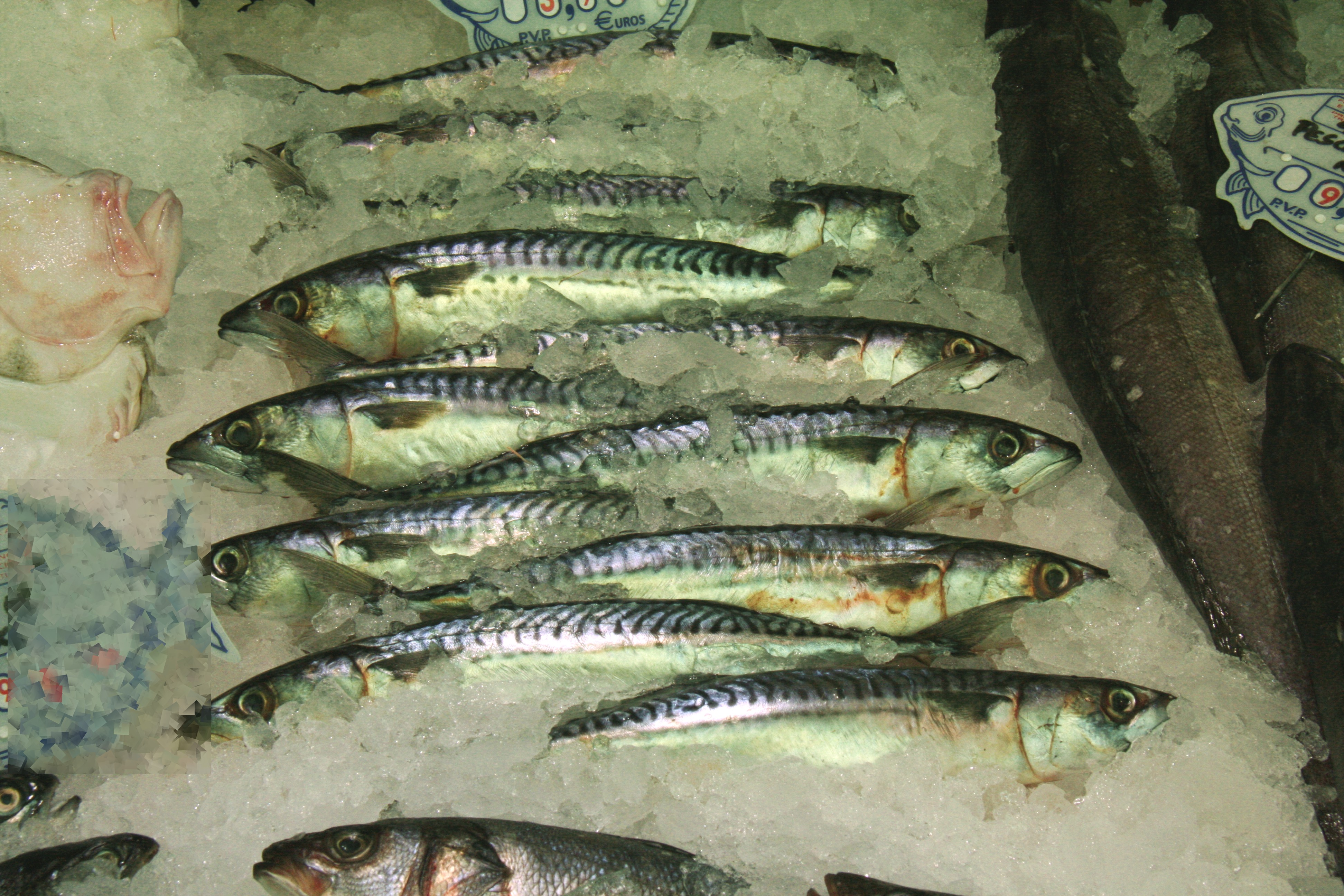 Caballas frescas